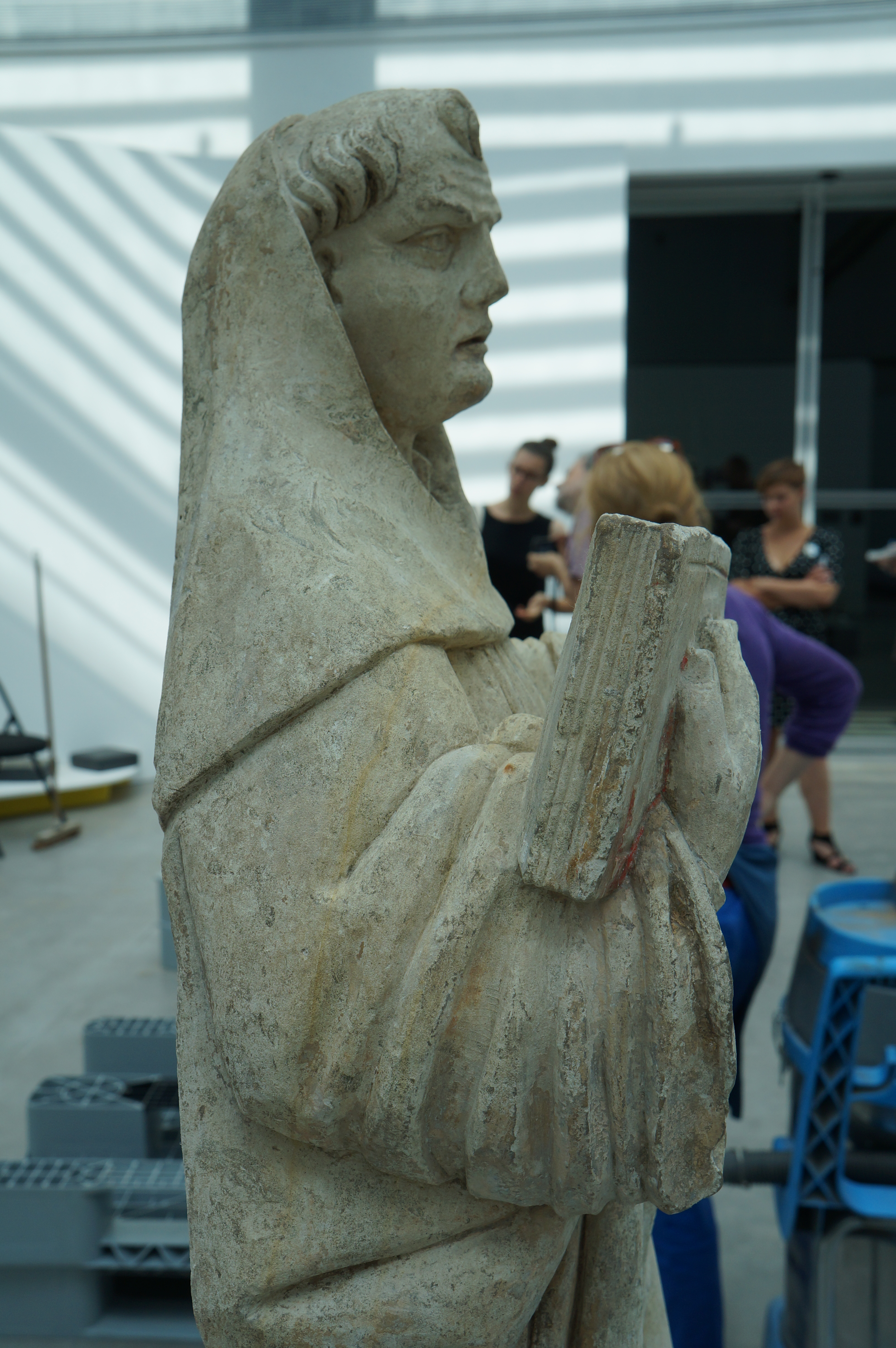 Moine1 ; vue de profil ; restauration des Belles du Nord au Palais des Beaux-Arts de Lille en juillet 2016.